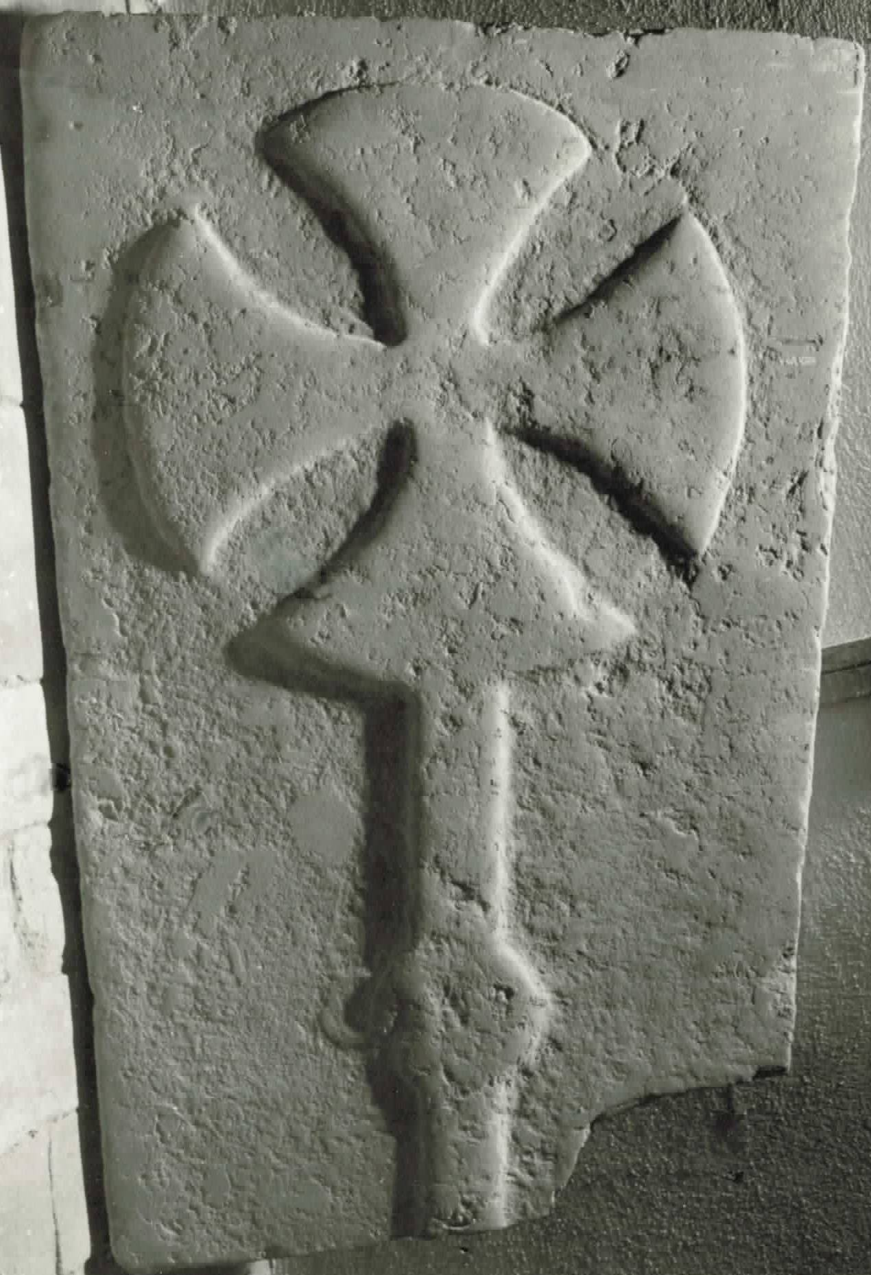 Gotische Grabplatte in der Dorfkirche in Kirchdorf/Poel mit Scheibenkreuz